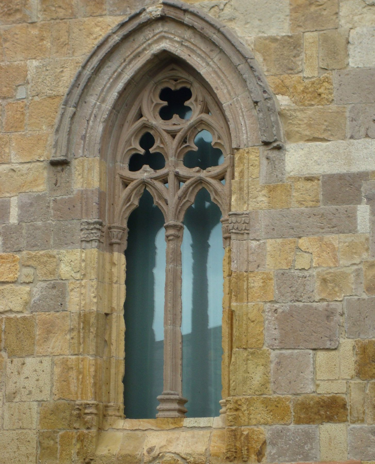 Bifora sul lato posteriore della chiesa di San Gregorio Magno a Sardara.